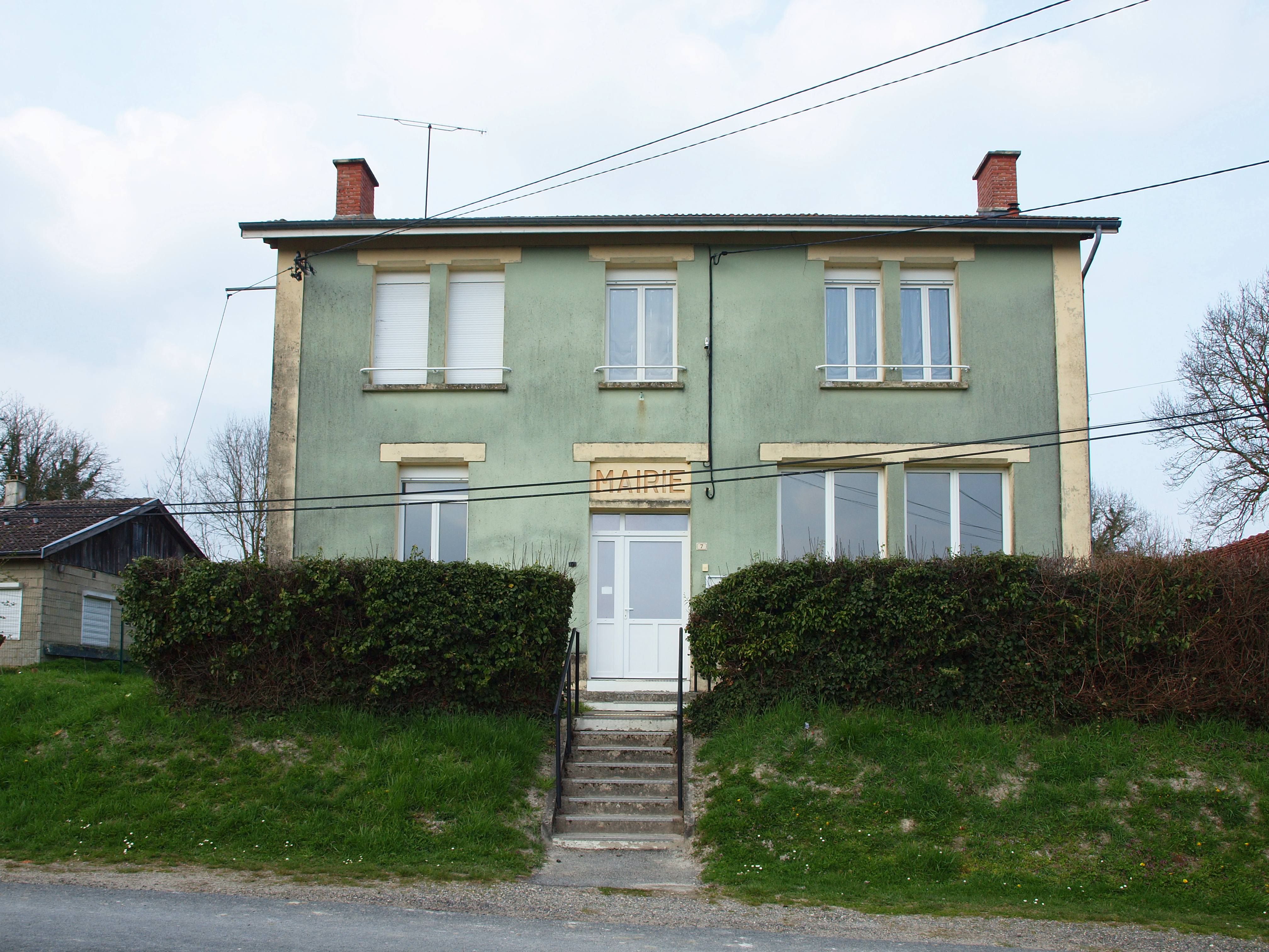 Fontaine-en-Dormois (Marne, France)